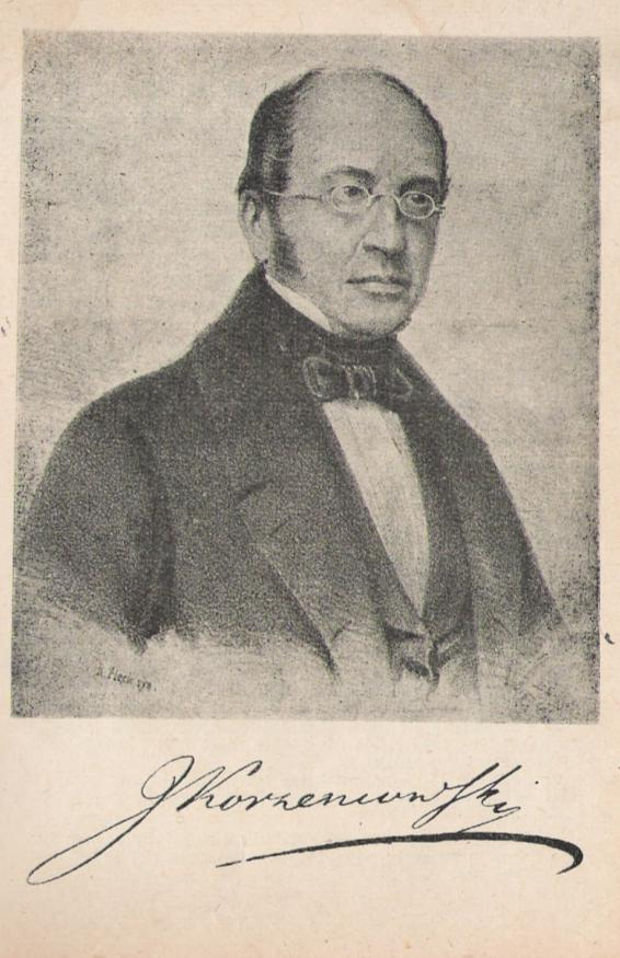 Portret Józefa Korzeniowskiego